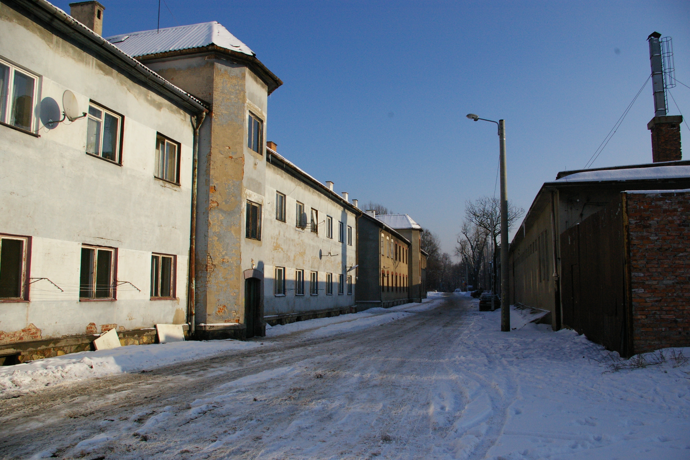 Jaworzno Szczakowa; ul. Koszarowa. Budynki po jednostce armii austro-węgierskiej, chroniącej węzeł kolejowy.